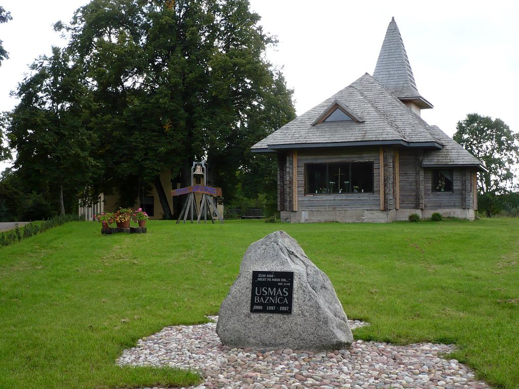 Usmas baznīca Usmā 2008-08-04